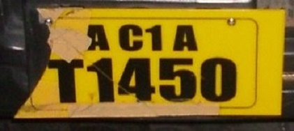 Yellow license plate, Maldive Islands; foto feta per J. Ollé el juliol del 2006